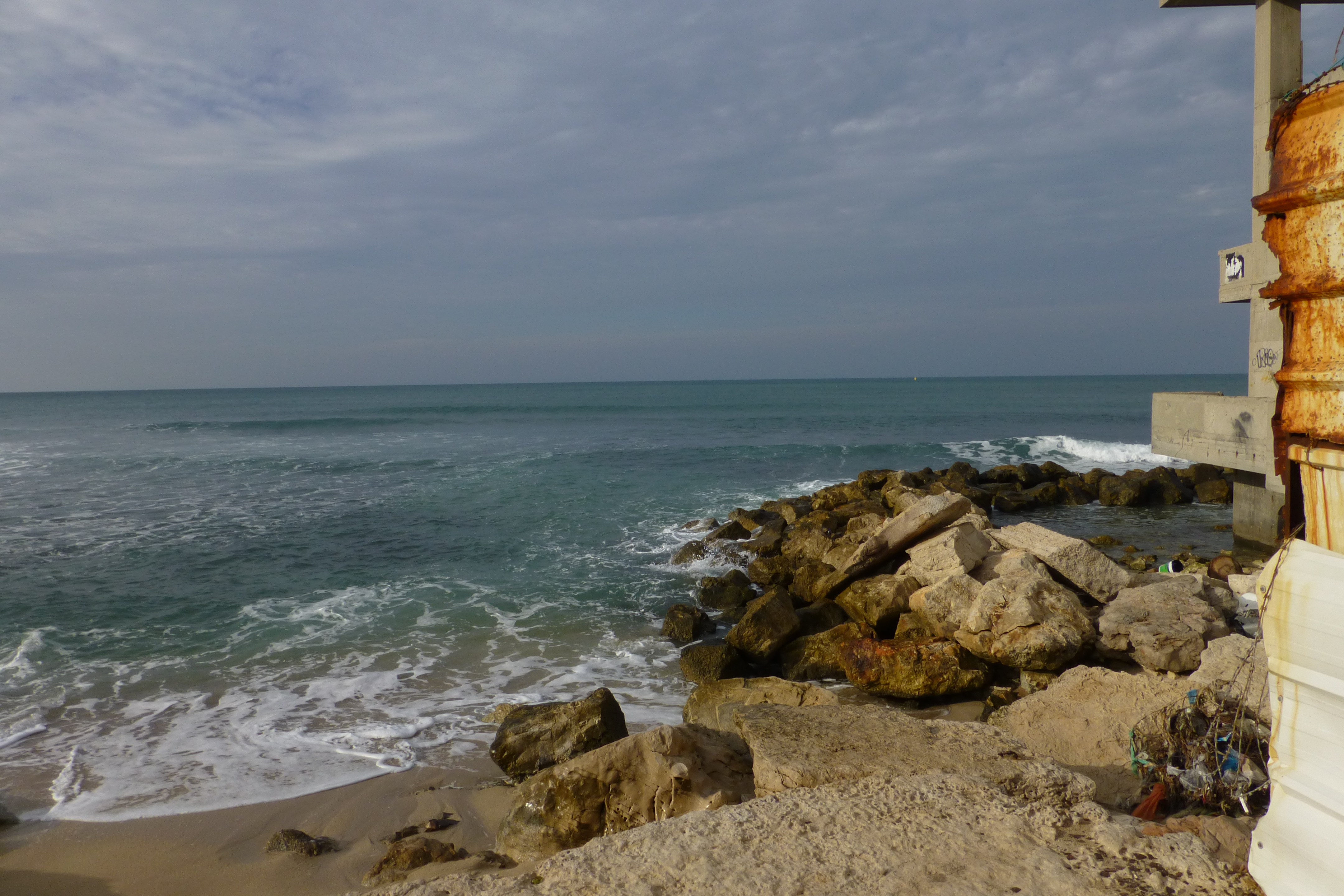 קזינו בת גלים היה מבנה בשכונת בת גלים בחיפה ששימש לפעילויות קהילה ופנאי משנות ה-30 של המאה ה-20, אך נהרס לאחר שנים, וכיום ניצב במקומו שלד בטון. חרף שמו, לא שימש המקום מעולם כקזינו.